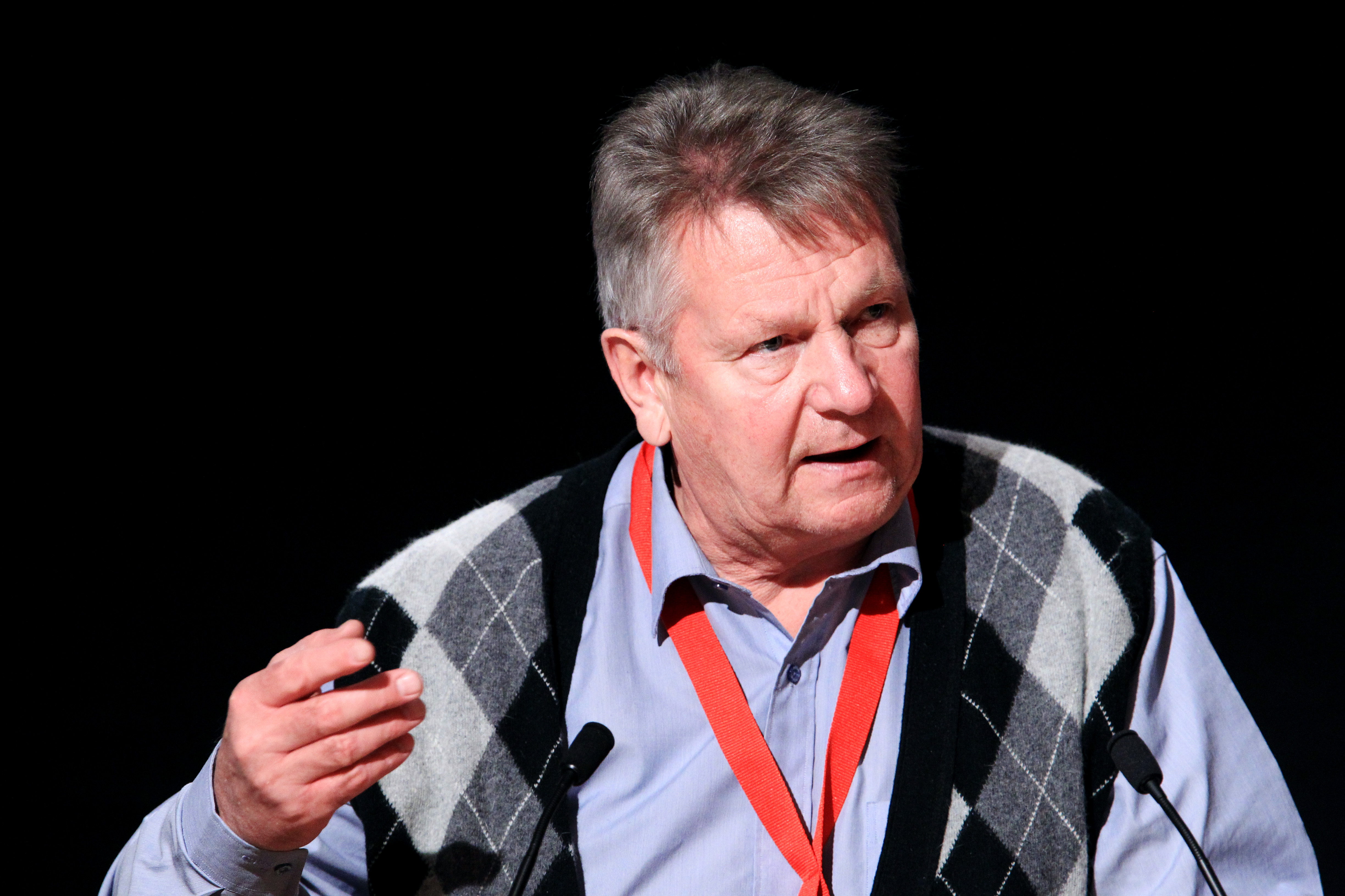 Bjarne Kallis vid Nordiska Rådets session i Reykjavik på Island. 2010-11-03.